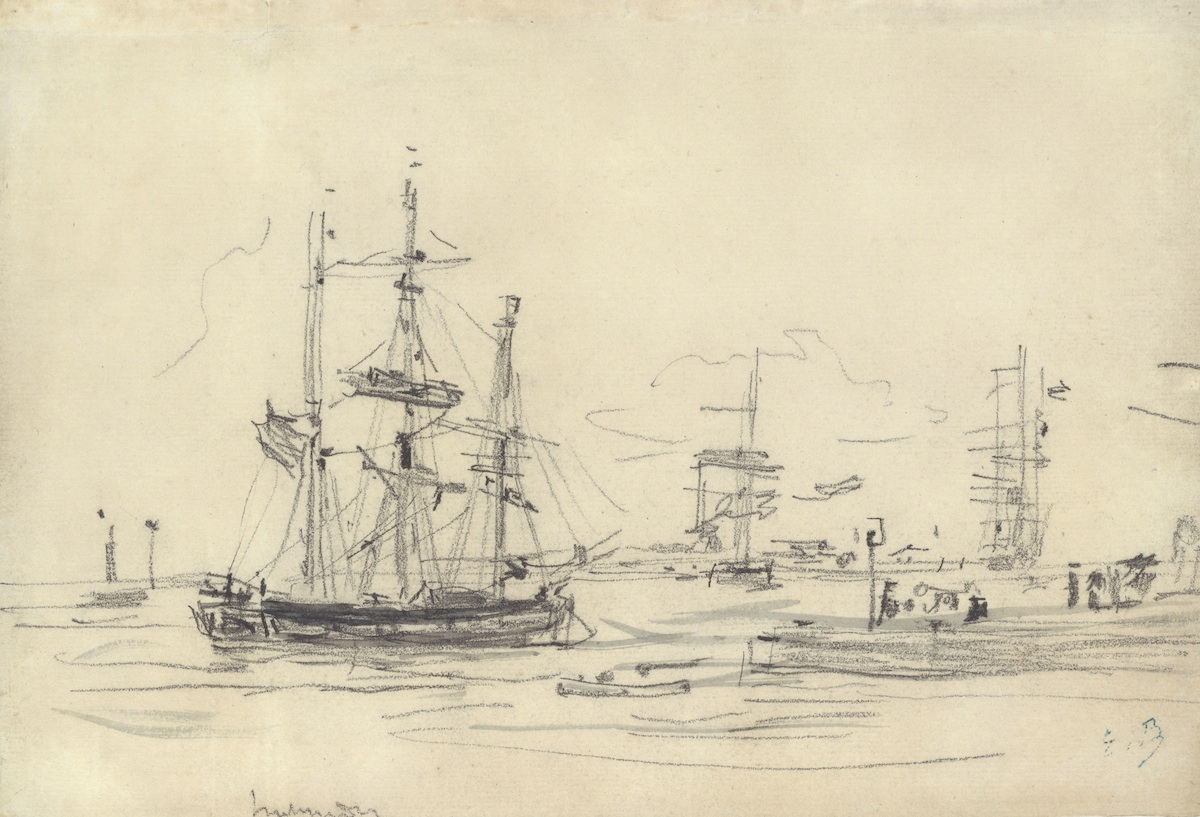 Crayon et lavis sur papier. 20 cm x 29.2 cm Cachet d'atelier en bas à droite. Dessin reproduit dans Boudin de C.Roger-Marx 1927 Collection privée